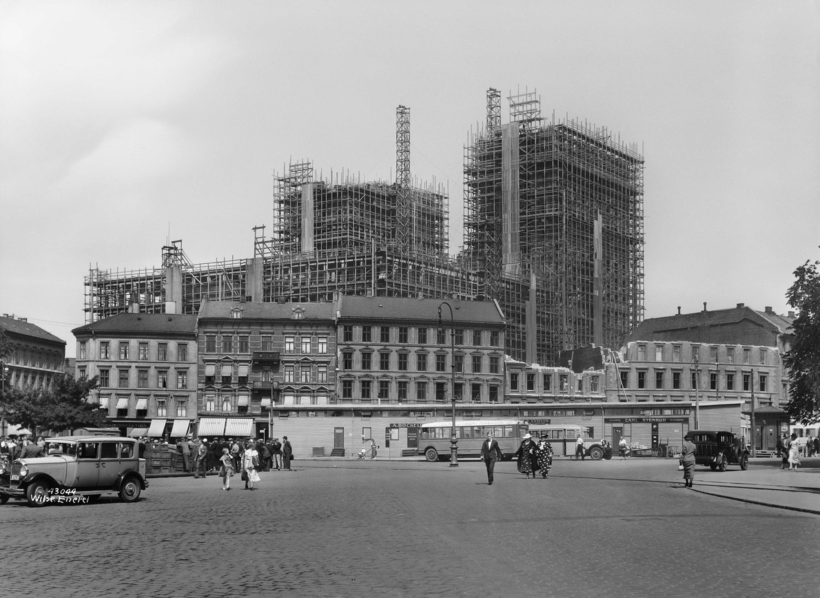 Husrekken i Sjøgaten blir revet, 9. juli 1935. Foto: Anders Beer Wilse/Oslo Museum.